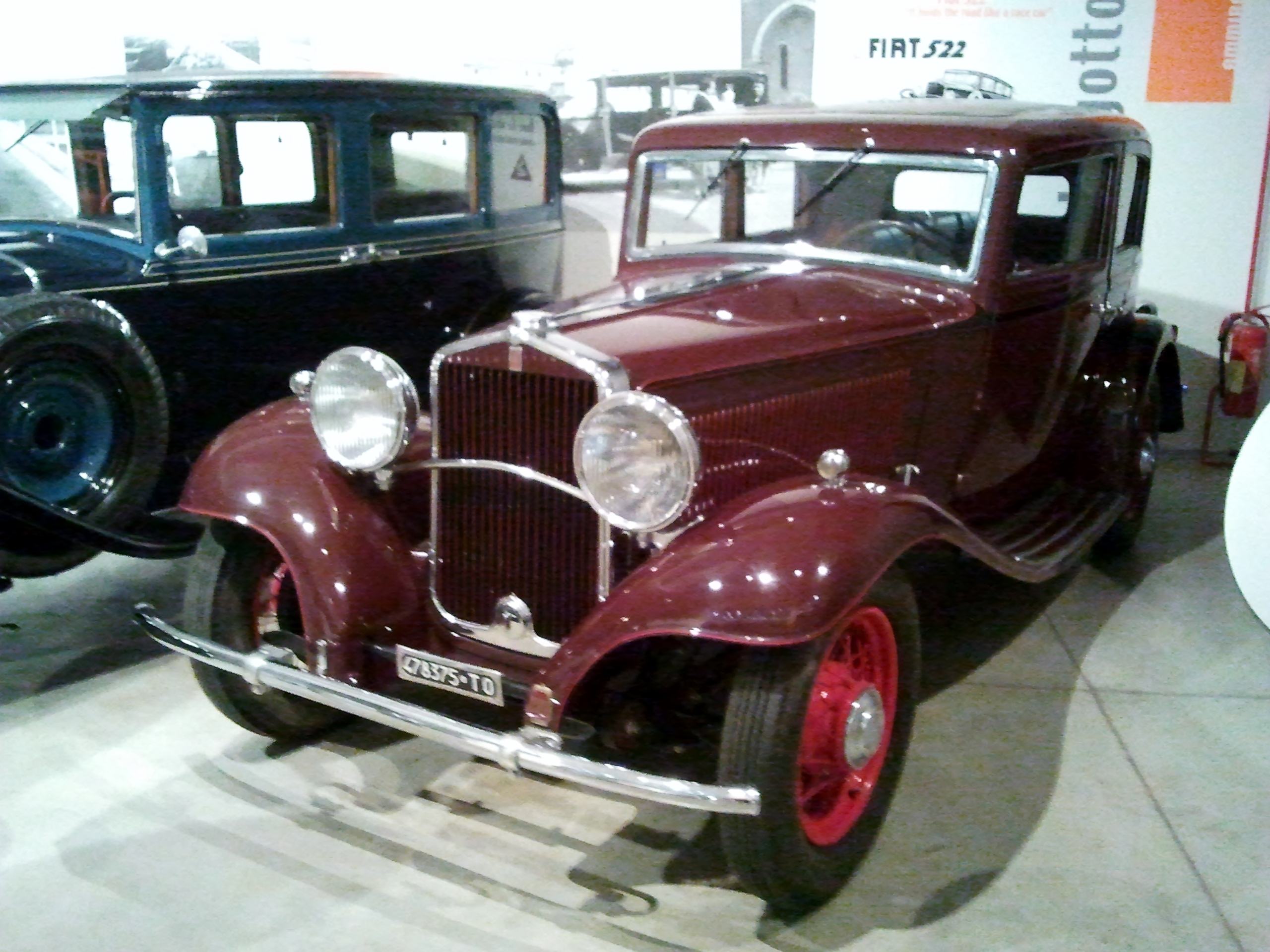 Fiat 522 S en el Centro Storico Fiat